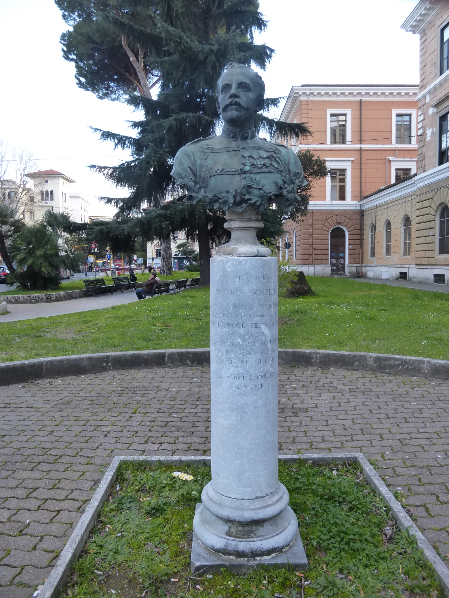 Roma, via Lepanto, Busto del maggiore Piero Toselli (1901) all'ingresso della caserma Nazario Sauro.